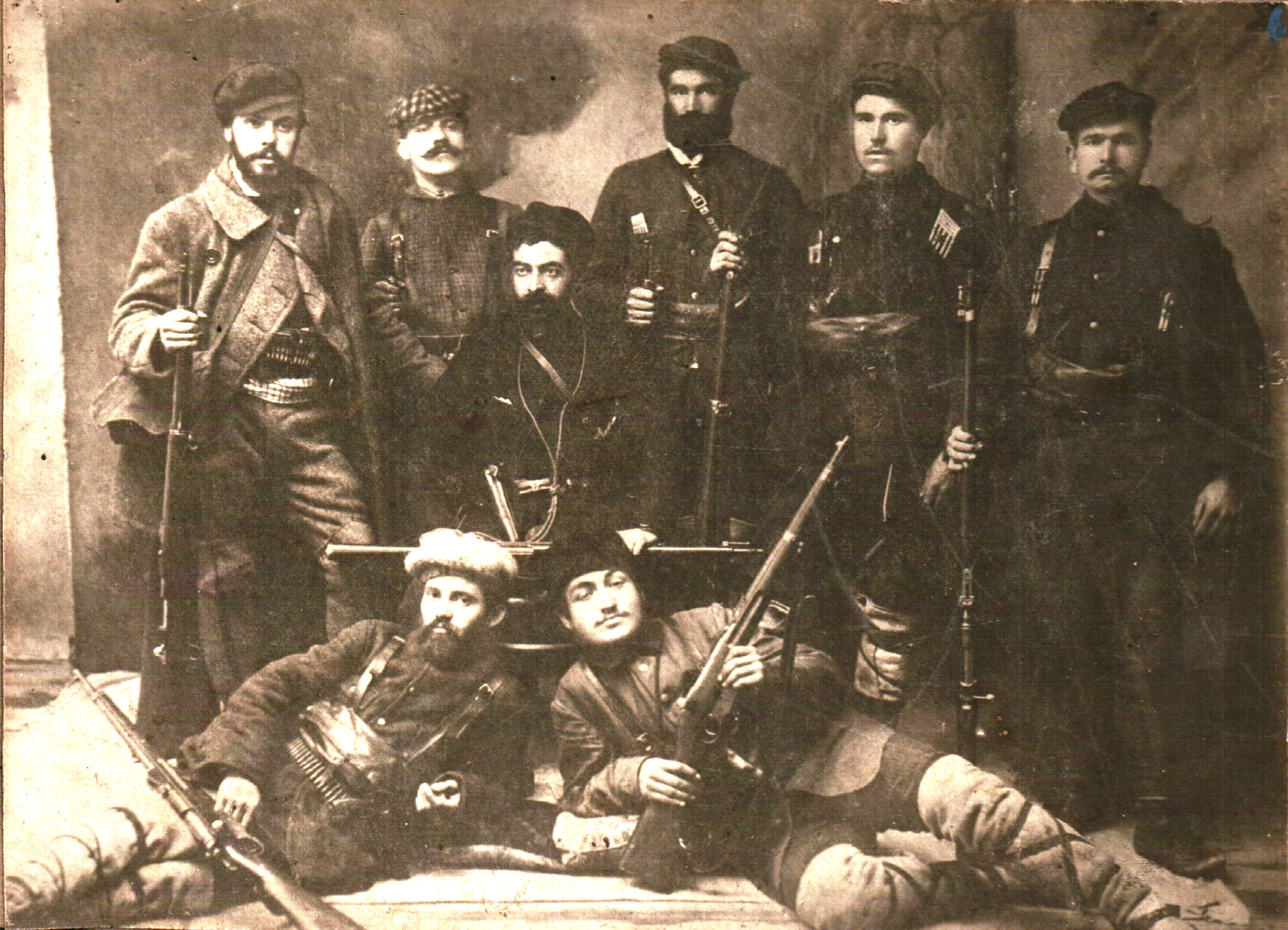 Партизански взвод 15 на Македоно-одринското опълчение, седналият е поетът Пейо Яворов. Отпред Коста Митев Саракостов (Адмирала) от Доганхисар и Иван Цървенков (Червенков) от Прилеп, отзад Любен Казаски от Търново, Григор Белокапов от Кюстендил, Тодор Ветренски от Ветрен, Георги Венедиков от Самоков и Христо Иванов от Долно Драглища, Кавала, 8 октомври 1912 г.